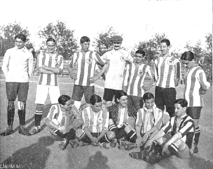 Equipo de fútbol de la Real Sociedad de San Sebastián en noviembre de 1912